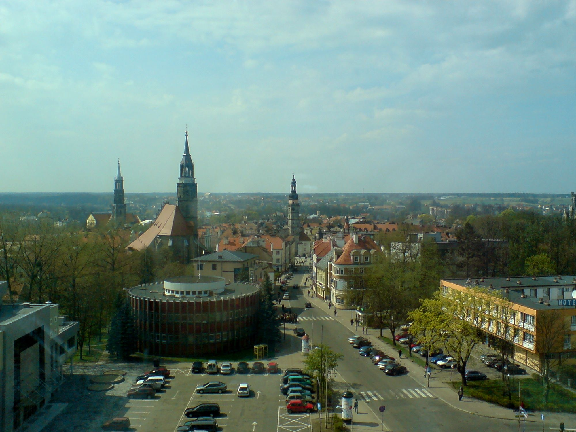 Bolesławiec. Panorama z biurowca w kierunku zachodnim. Widok na Rynek i okolice oraz Zabobrze.